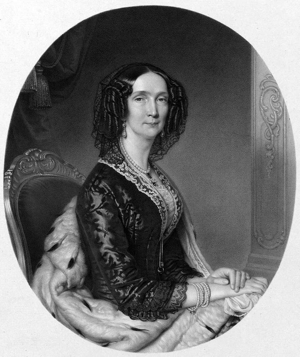 Sophie, Prinzessin von Bayern-Zweybrücken-Birkenfeld Lithografie von Franz Eybl nach Gemälde von Anton Einsle.